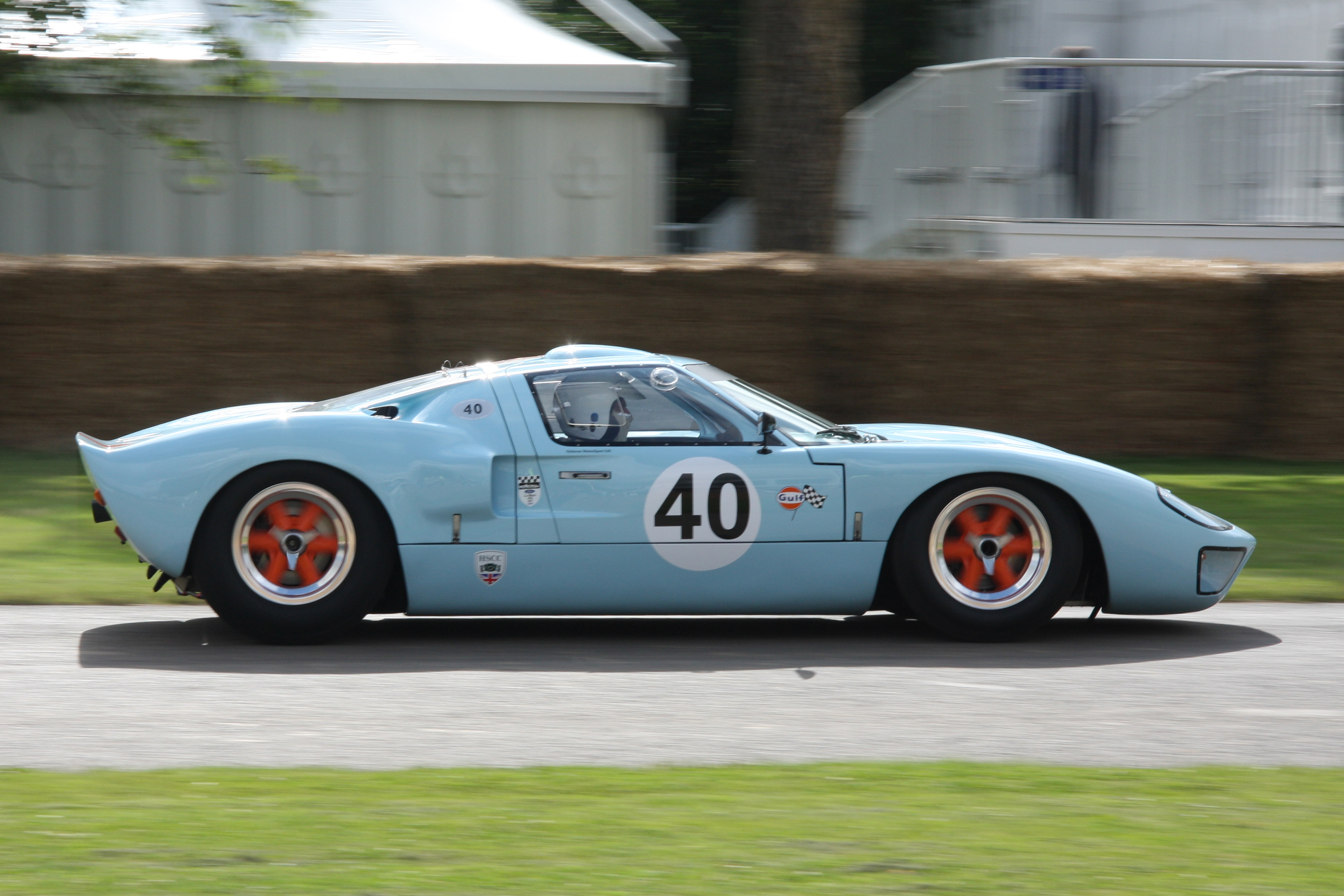 Built 1965. 4.7 litre V8.